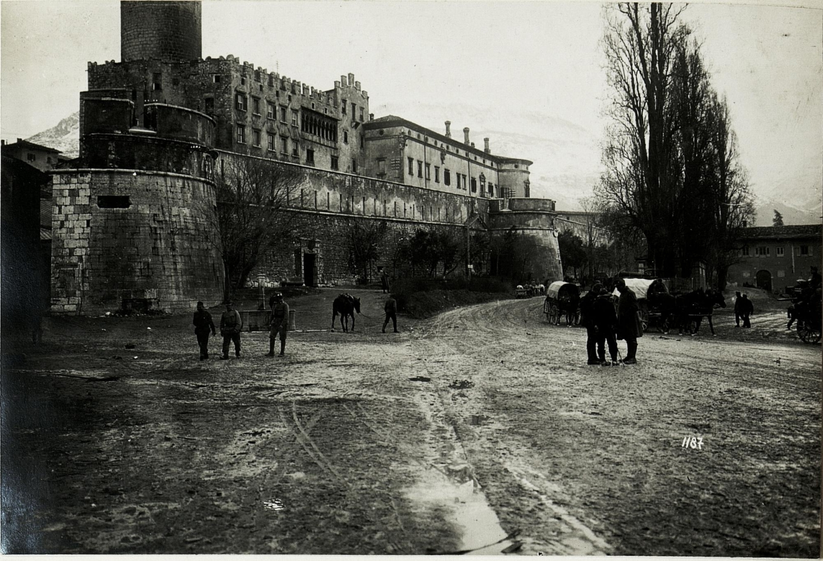 Trient, Castell, ehemaliges Bischofspalais.